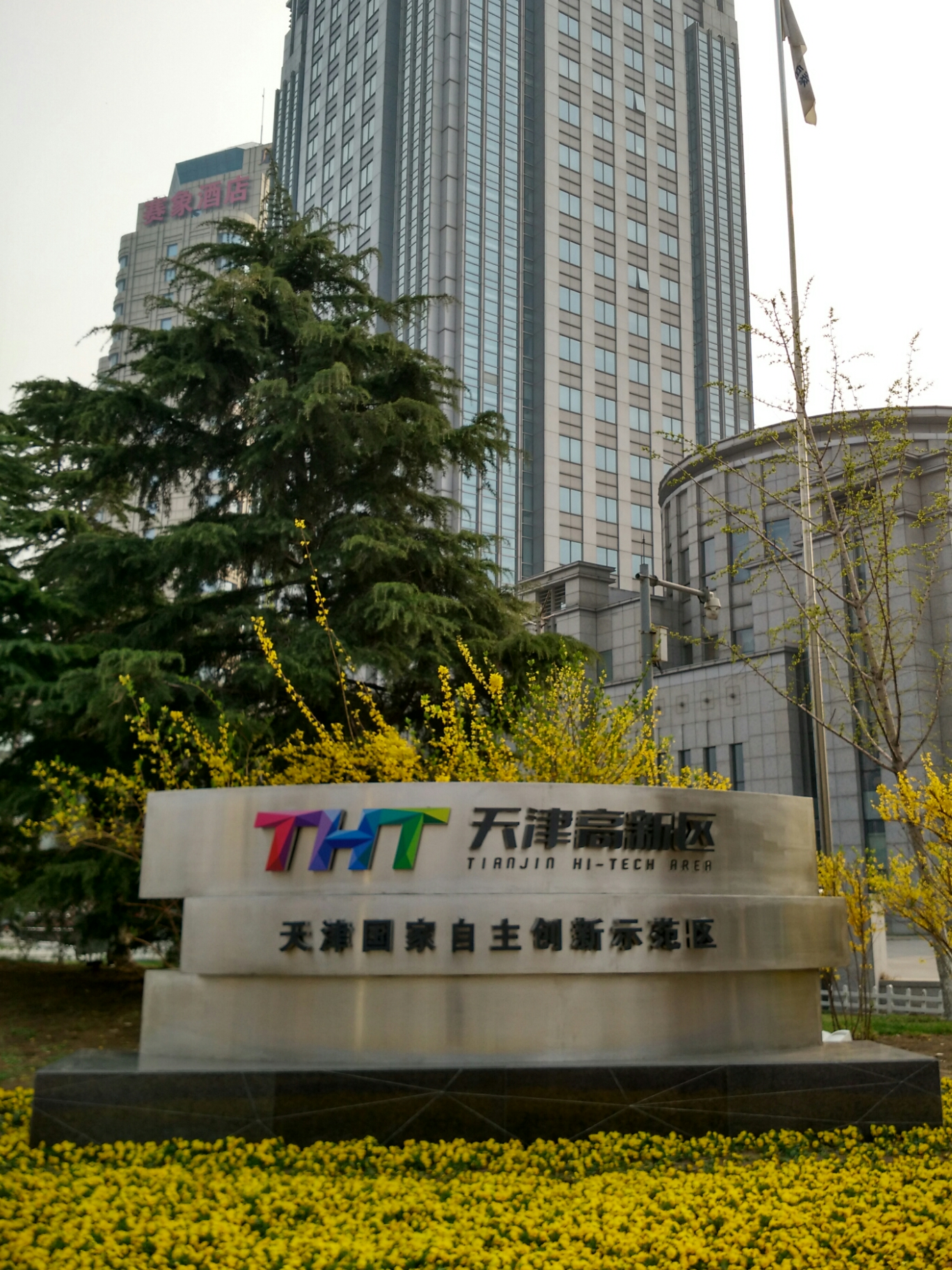 天津国家自主创新示范区标志牌